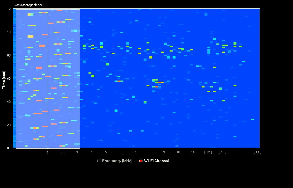 無線LANとBluetoothを使用している時のスペクトルアナライザーの表示。 画面中には２分間分の表示がされている。 スペクトル拡散が行われているのがわかる。 投稿者によりWi-Spyスペクトルムアナライザーを使用して生成。